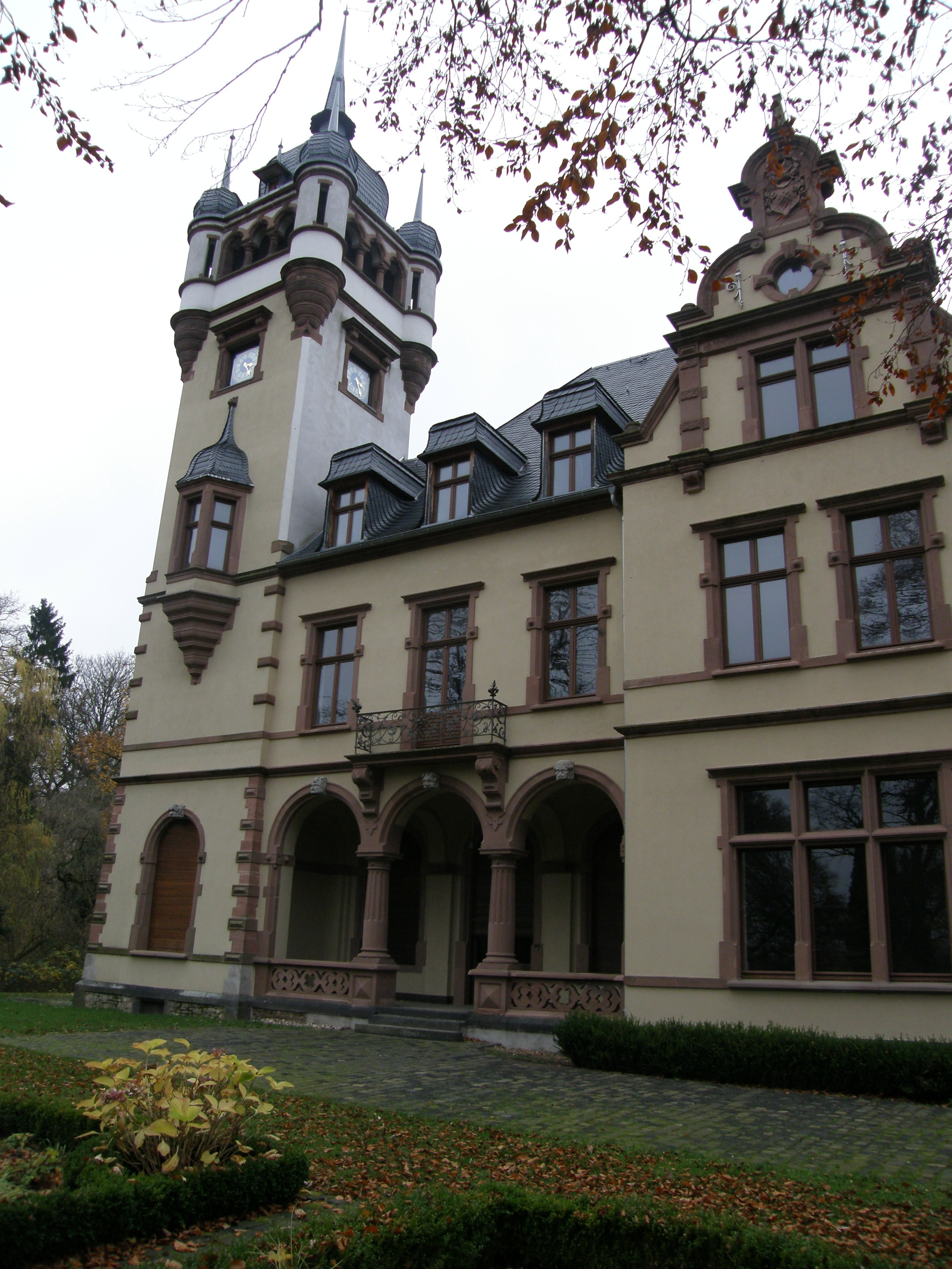 Gut Mielenforst, Köln-Dellbrück